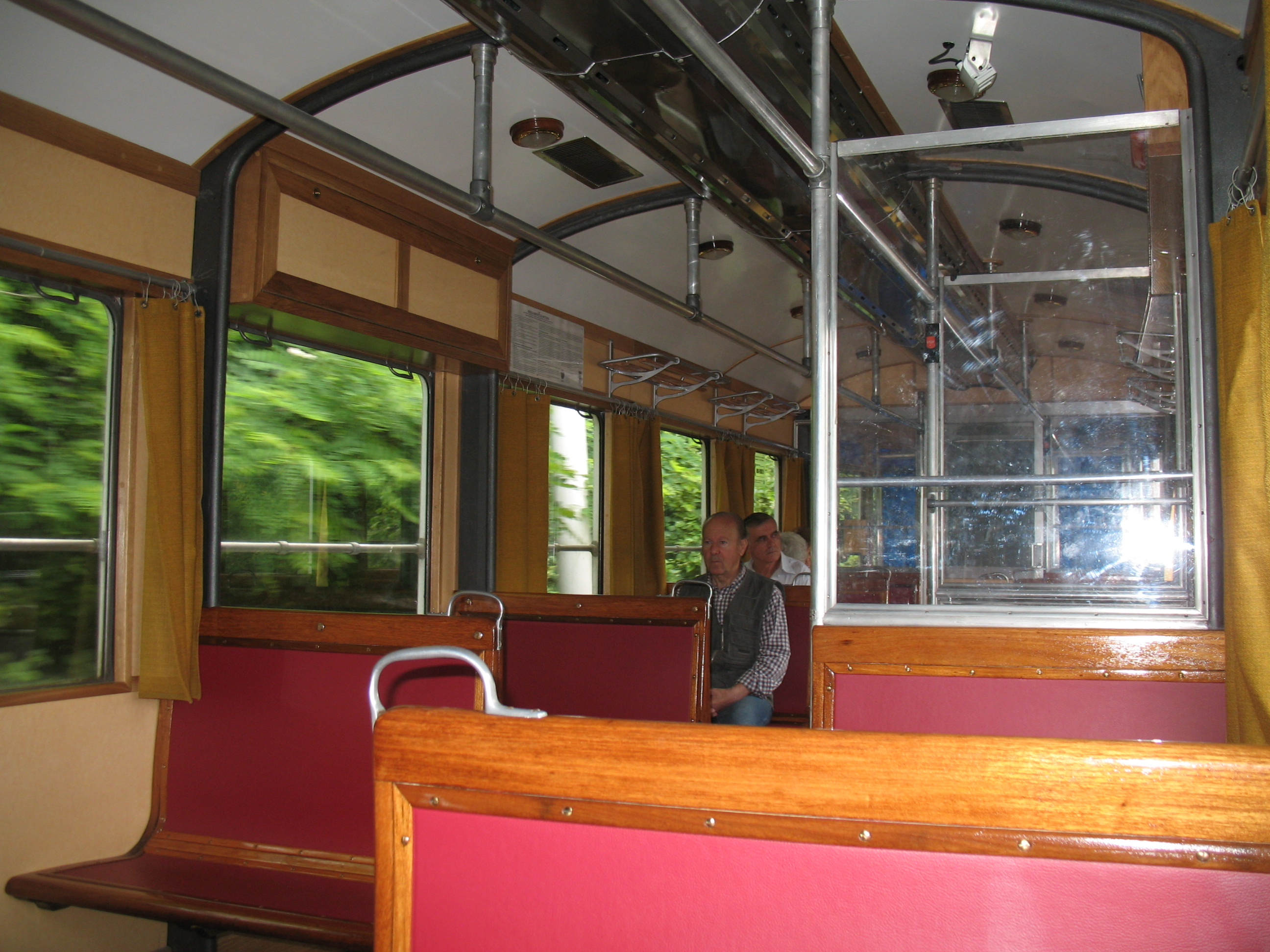 Immagine da Trieste. Trenovia di Opicina - interno